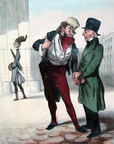 Lithographie couleur